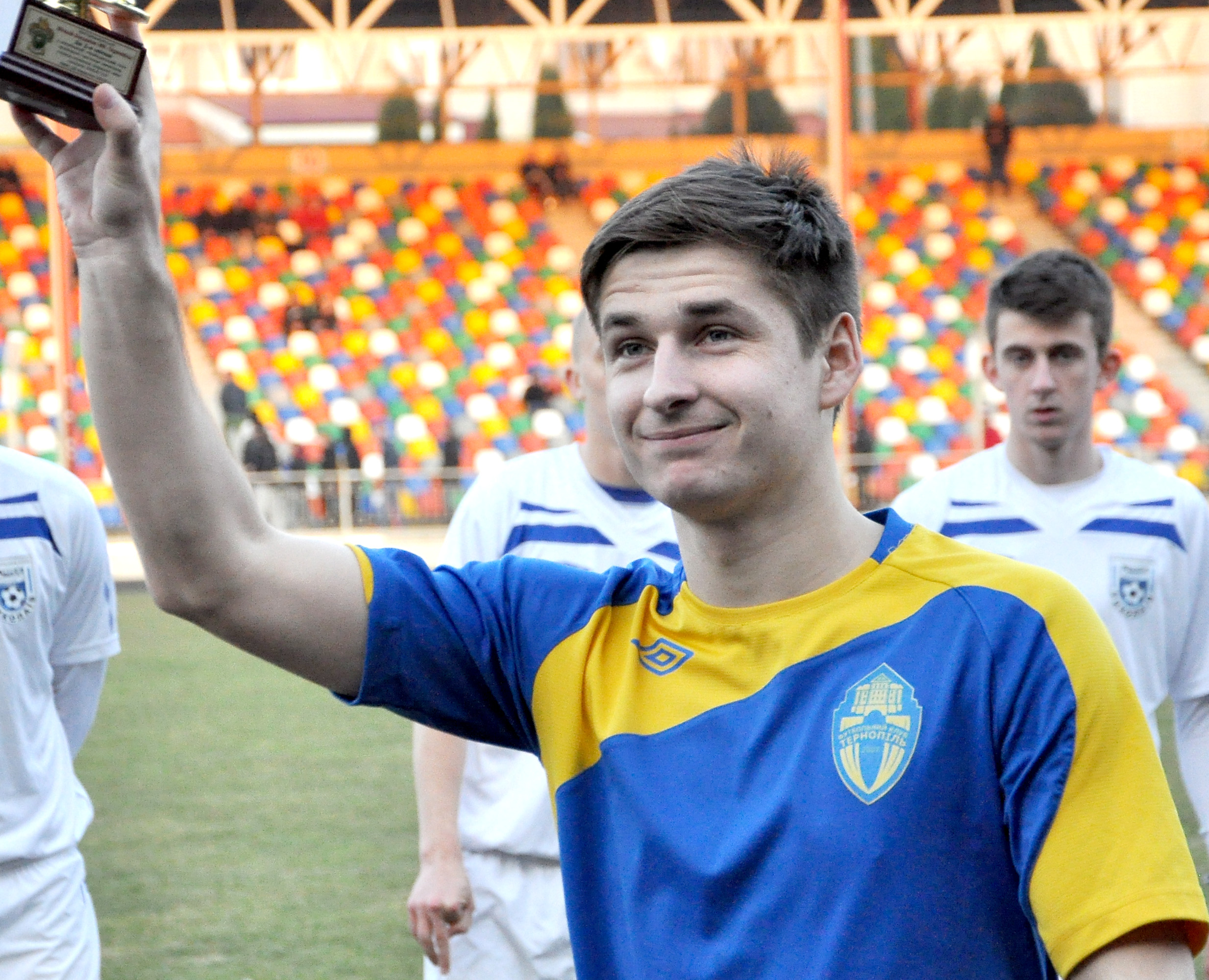 Український футболіст, півзахисник ФК «Тернопіль» Віталій Геннадійович Богданов.